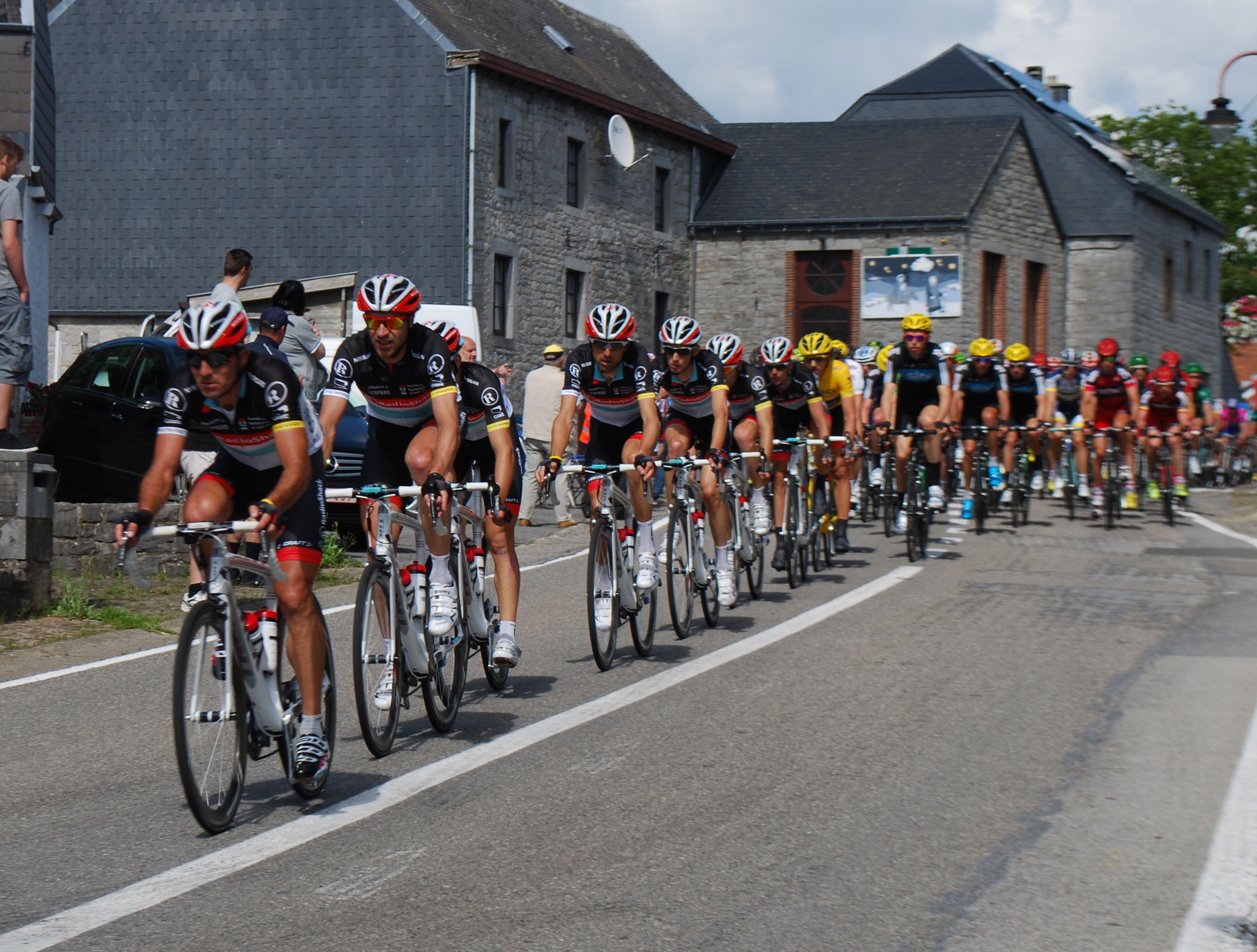 Vue du passage du peloton du Tour de France 2012 à Tohogne (Durbuy).